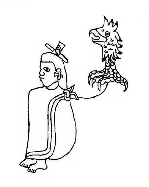 Posible representación de Cuauhtlequetzqui, basado en imagenes de otros códices como el Azcatitlan y el Códice mexicanus.